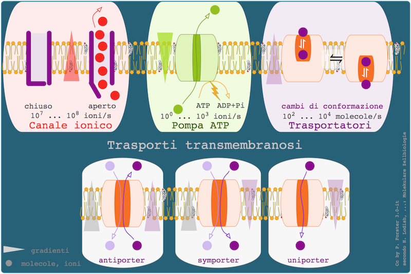 Membrana cellulare, canali proteici, canali ionici, uniporter, symporter, antiporter, pompa ATP, conformazione